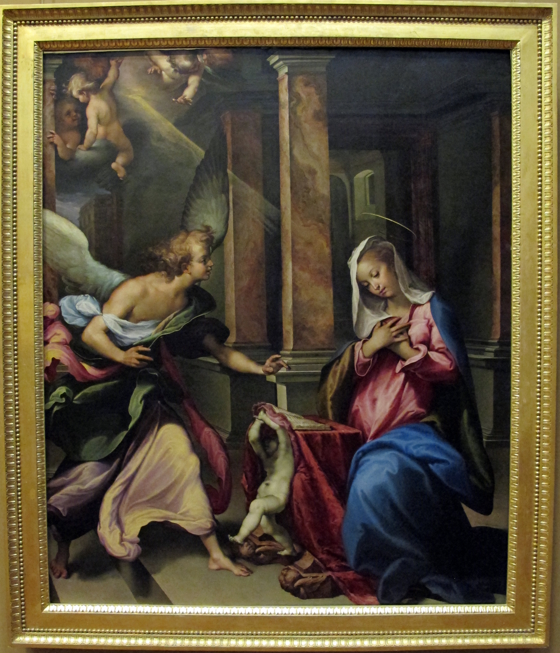 Galleria Napoletana (Museo di Capodimonte)